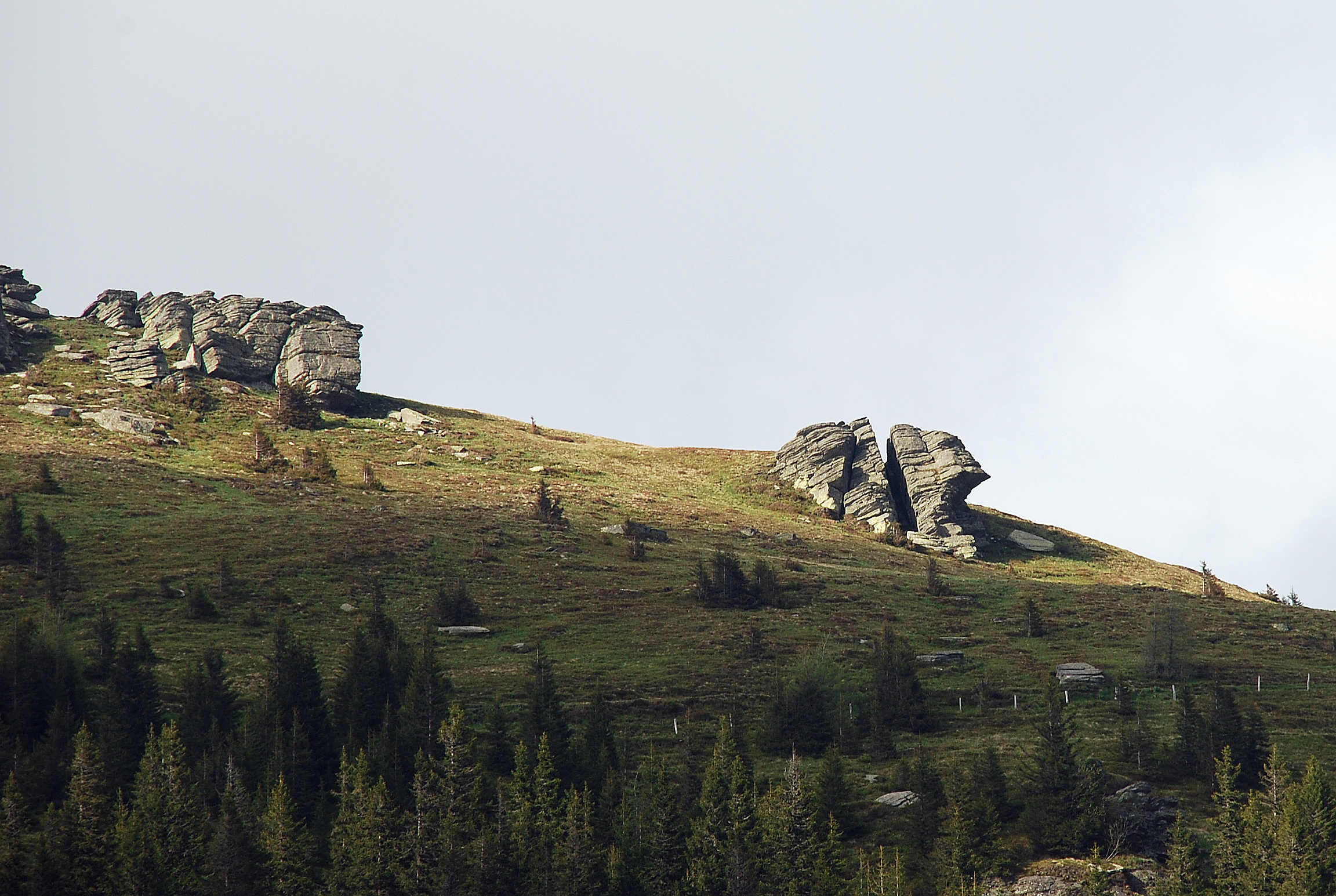 Gesteinsbildungen, sogenannten „Öfen“ („Steinöfen“, Verwitterungsformen aus Plattengneis) auf der Handalm, mittlere Koralpe, Steiermark, Österreich